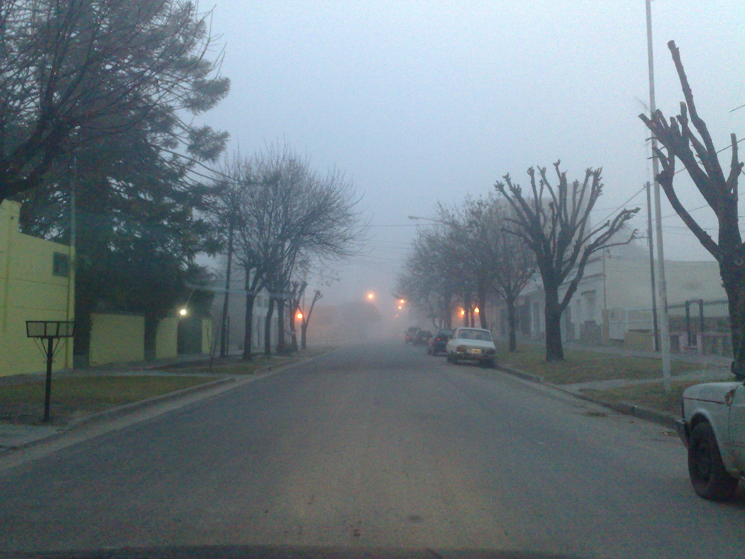 Calle San Martín. Crespo, Entre Ríos.